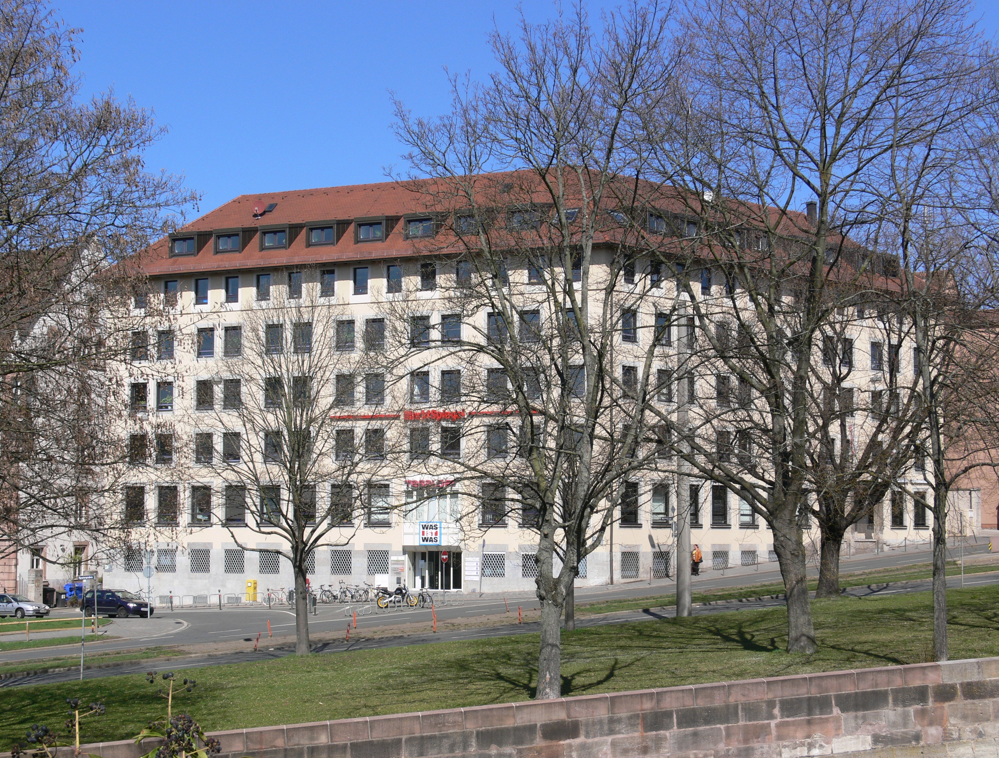 Nürnberg, Tessloff-Verlag